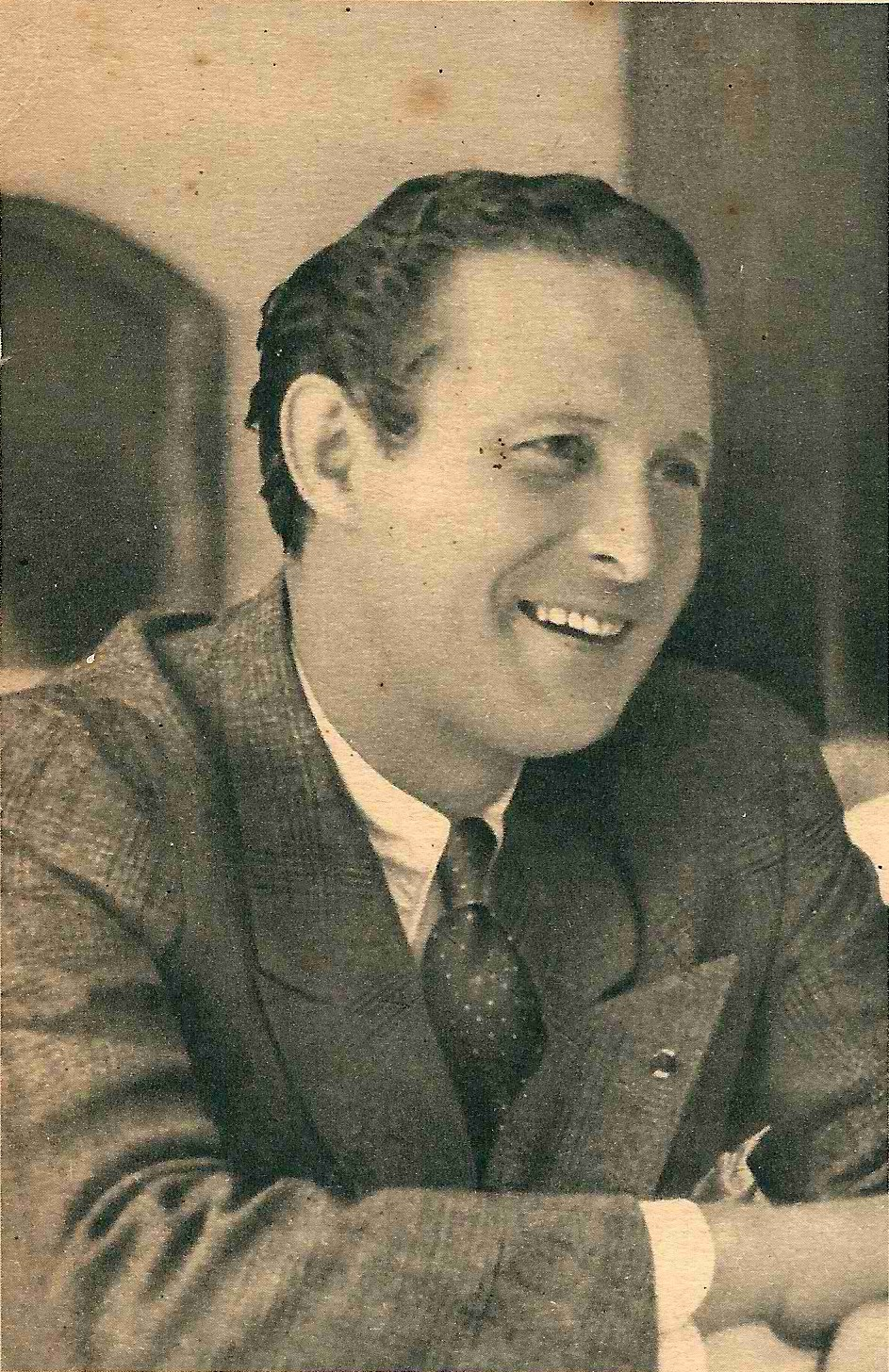 Jean Mermoz en tenue de ville